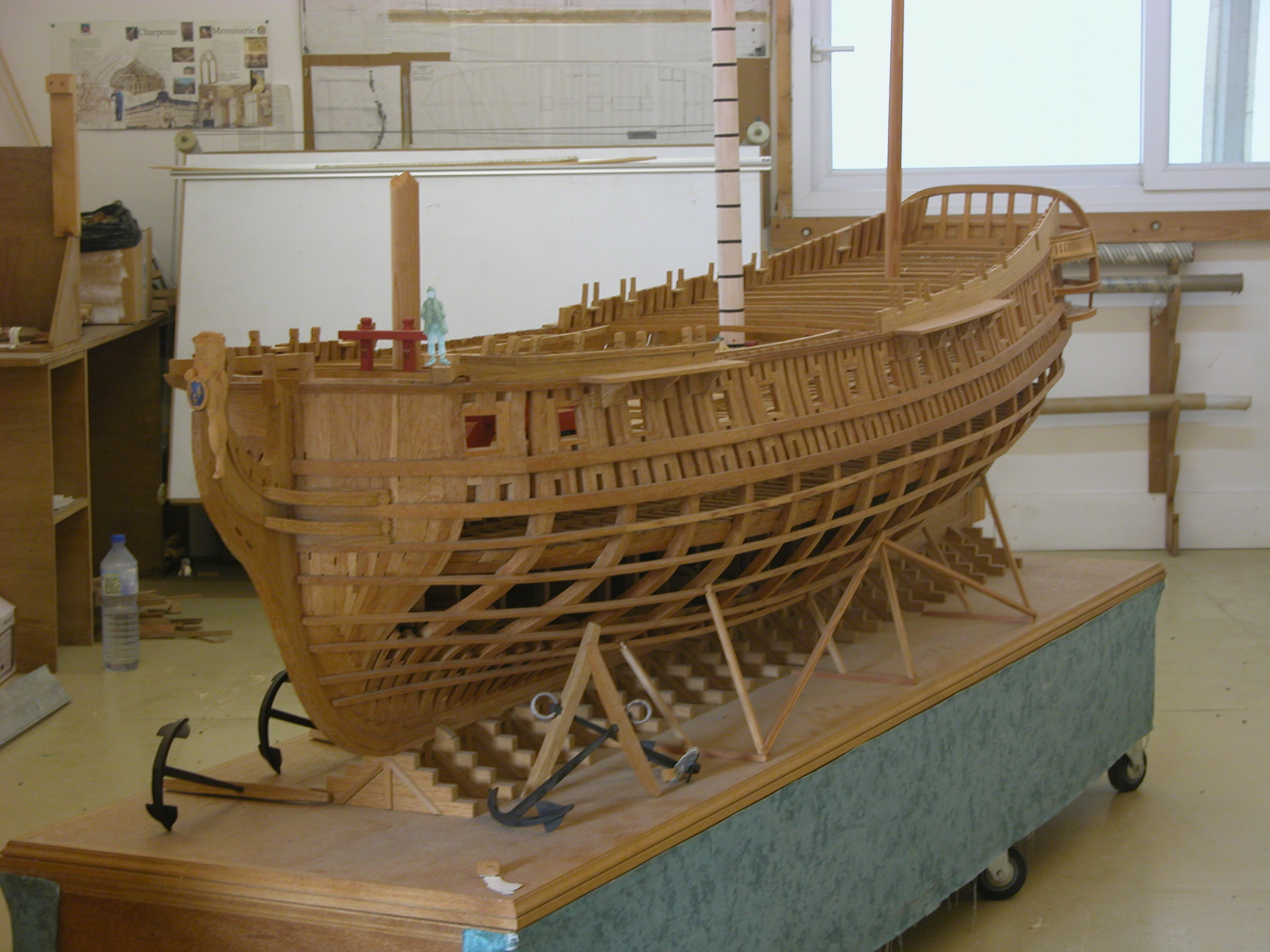 ModÃ¨le de l'Hermione utilisÃ© sur le chantier (Rochefort) - Septembre 2006 - Photo personnelle.